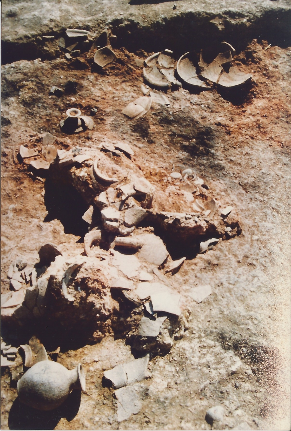 Alt de Benimaquia: Nivel de incendio del departamento 6. Los materiales aparecen caídos al suelo y abandonados. Arriba a la derecha, serie de platos apilados. Abajo, botella intacta. (600-560 a.C.).